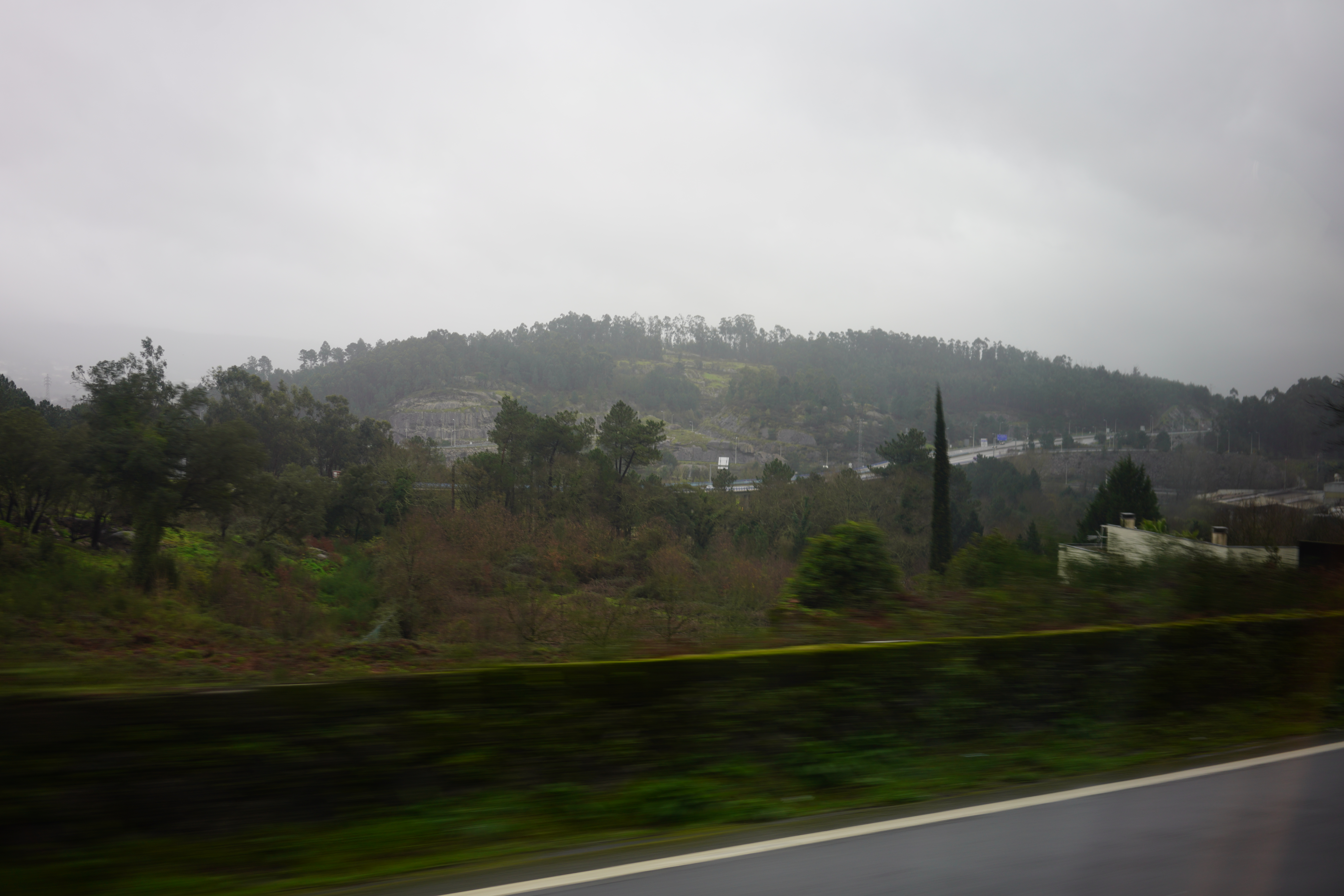 20200201_BragaSub_4336